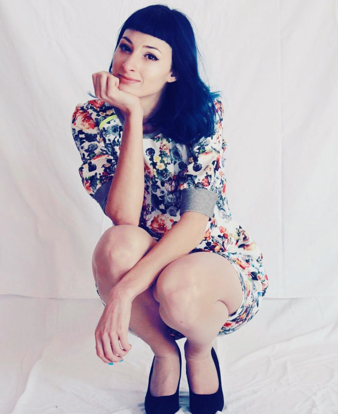 Behind the scenes with Olja Luetić (Olya Sookie)